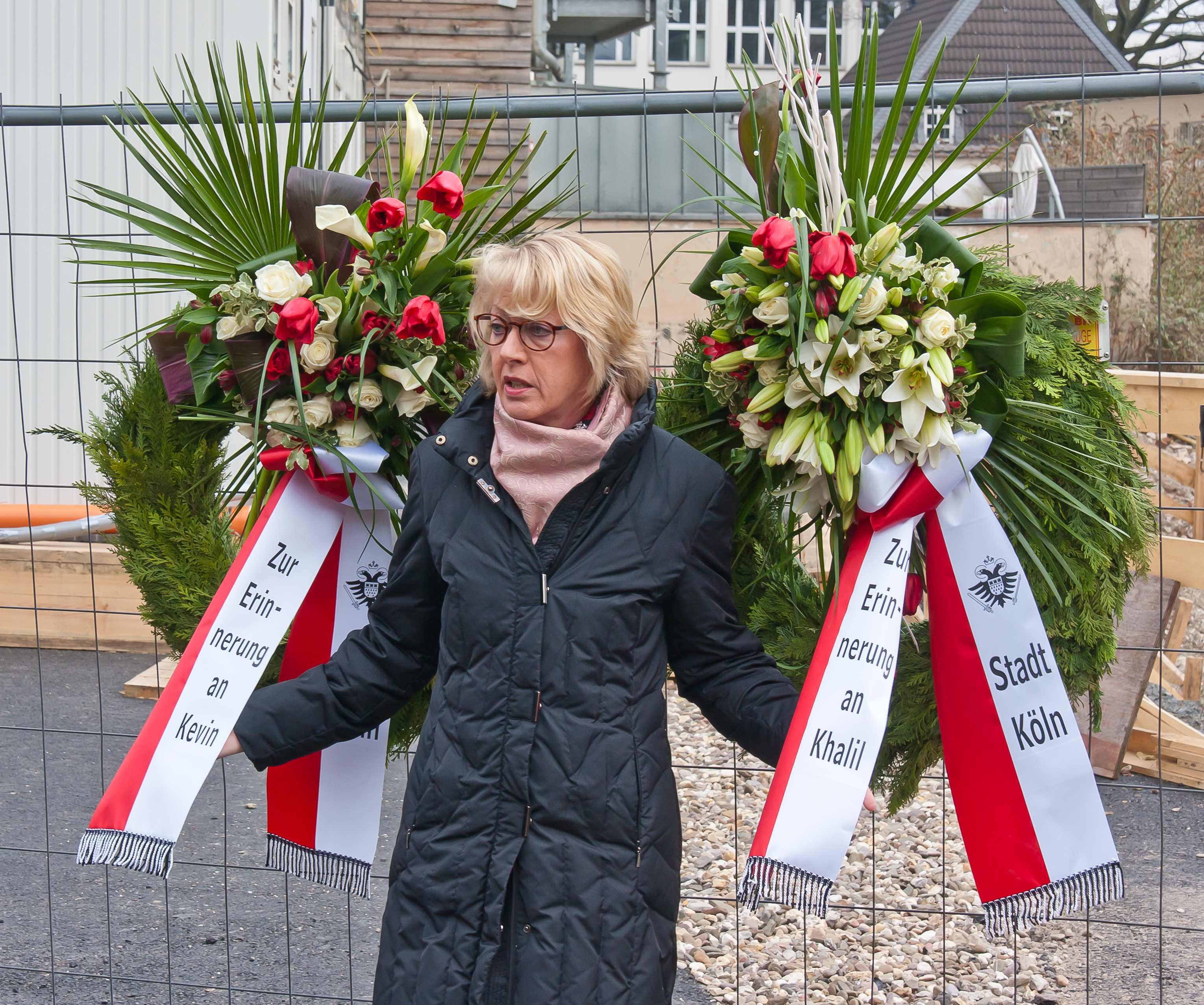 Gedenkfeier zum 4. Jahrestag des Einsturzes des Historischen Archivs Köln Foto: Ansprache durch Bürgermeisterin Elfi Scho-Antwerpes auf der Gedenkfeier der Stadt Köln an der Einsturzstelle zwischen den zwei Kränzen der Stadt Köln zum Gedenken an Kevin und Khalil, die beim Einsturz ums Leben gekommen sind.